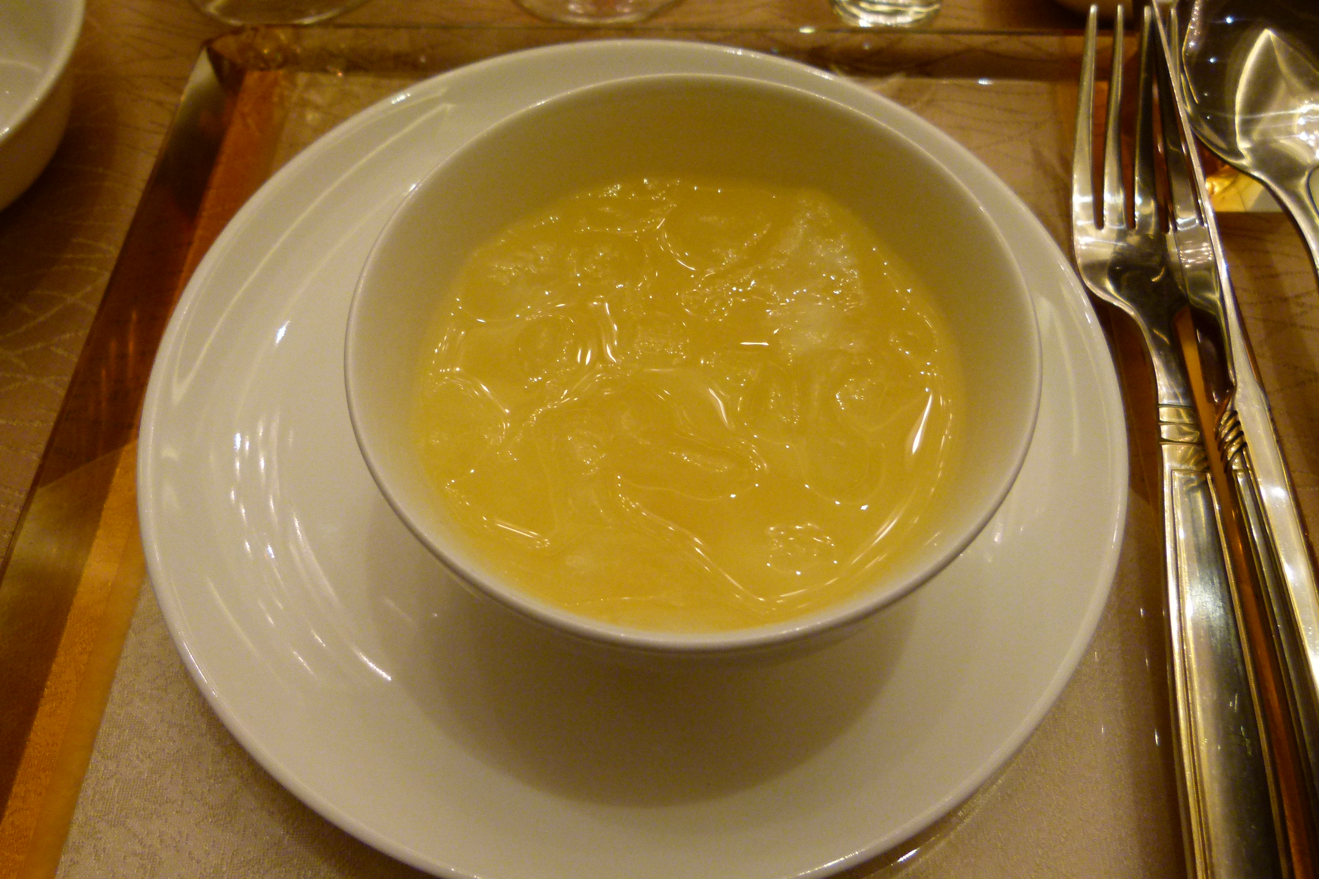 Chinesische Fruchtsuppe, basierend auf Melonen, in Lanzhou, Provinz Gansu, Nordwesten Chinas